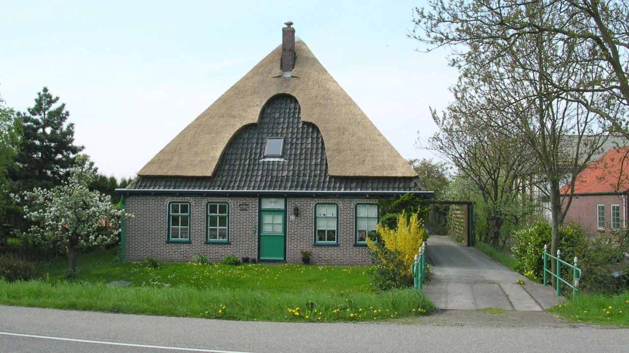 Een stolpboerderij langs de provinciale weg in Blokdijk. A farm besides a provincial road (highway like road) in Blokdijk.